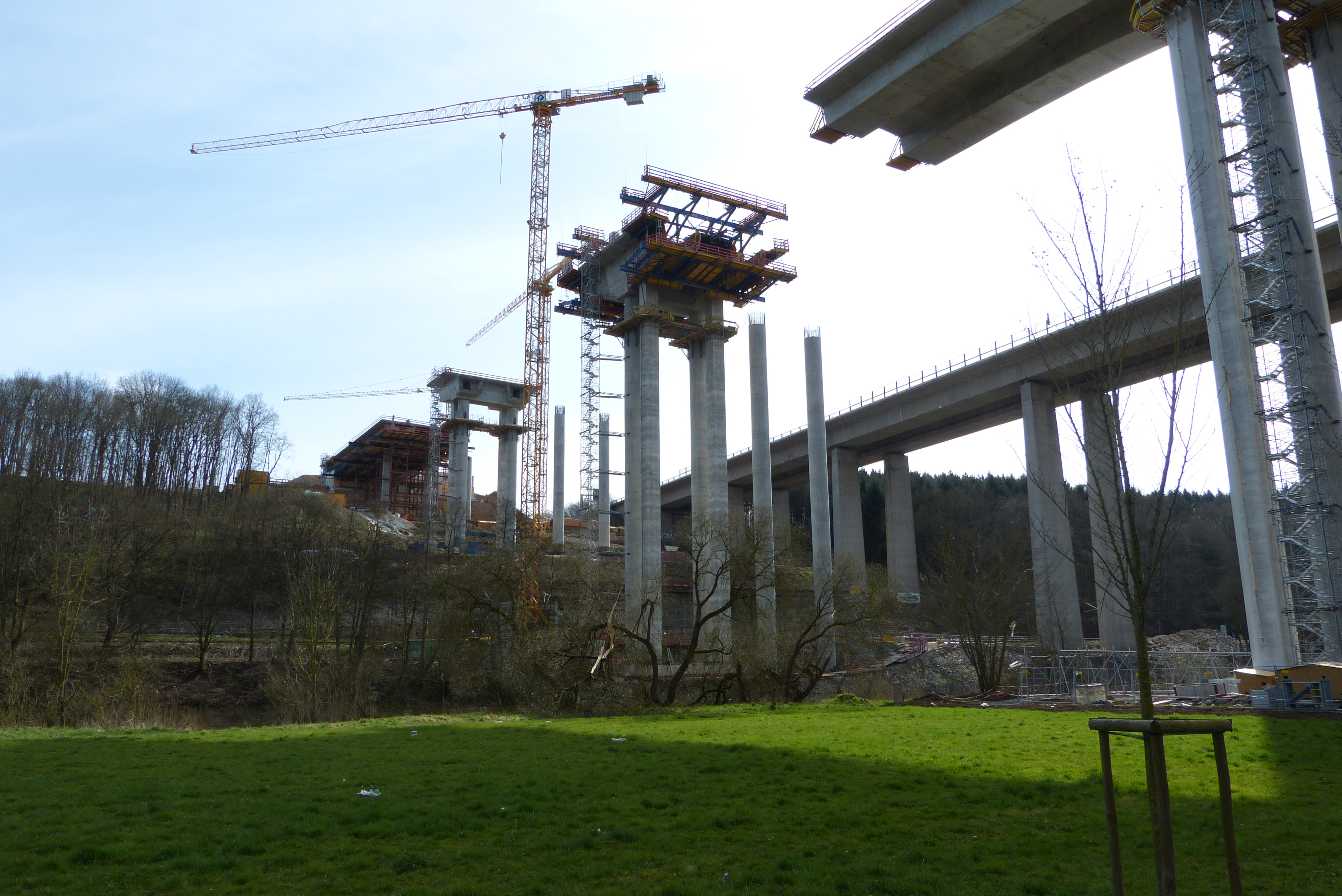 Neubau der Autobahnbrücke über das Lahntal bei Limburg, BAB A3; dahinter die bisherige Brücke